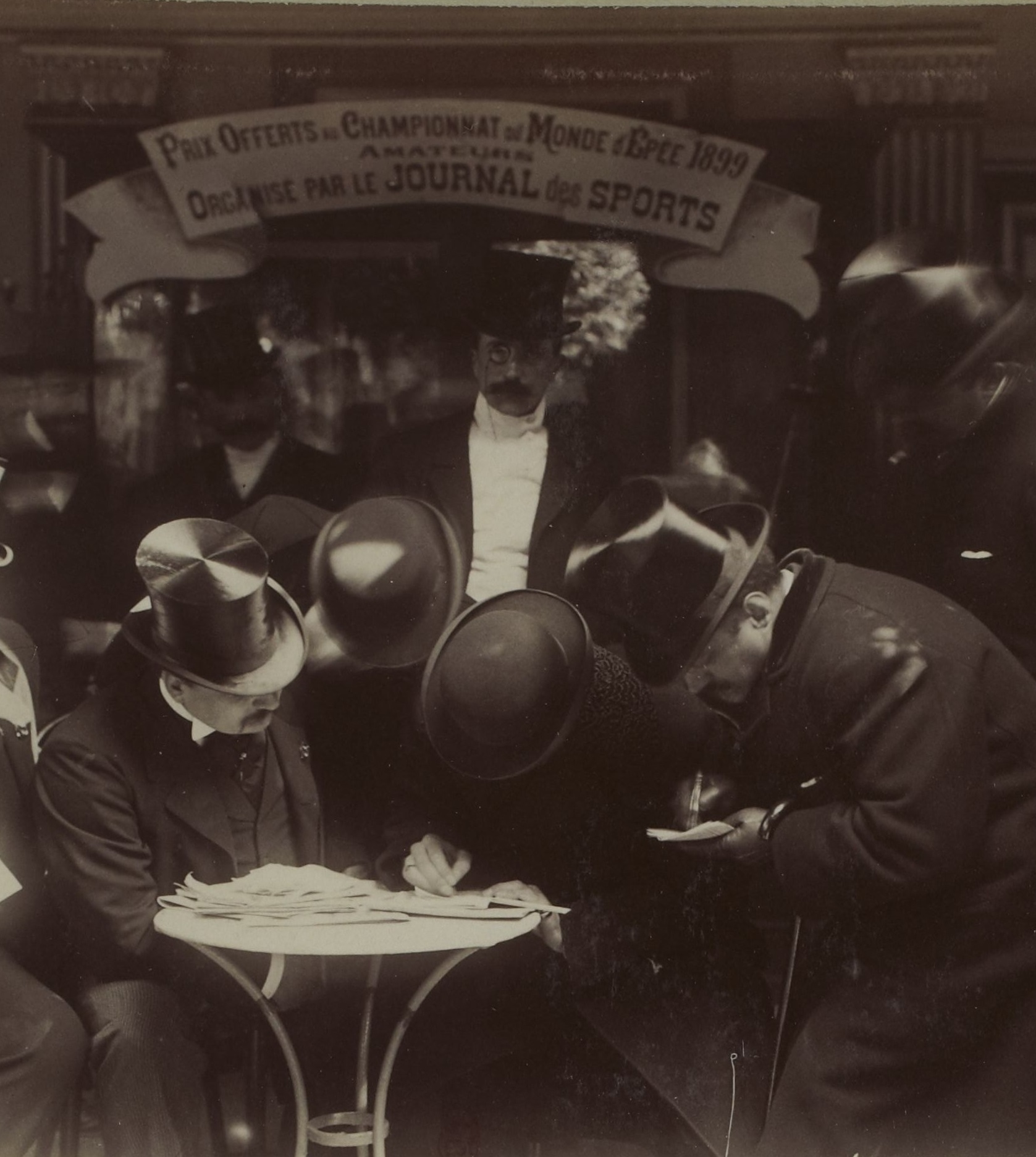 [Collection Jules Beau. Photographie sportive] : T. 9. Année 1899 / Jules Beau : F. 11v. Championnat du monde d' épée